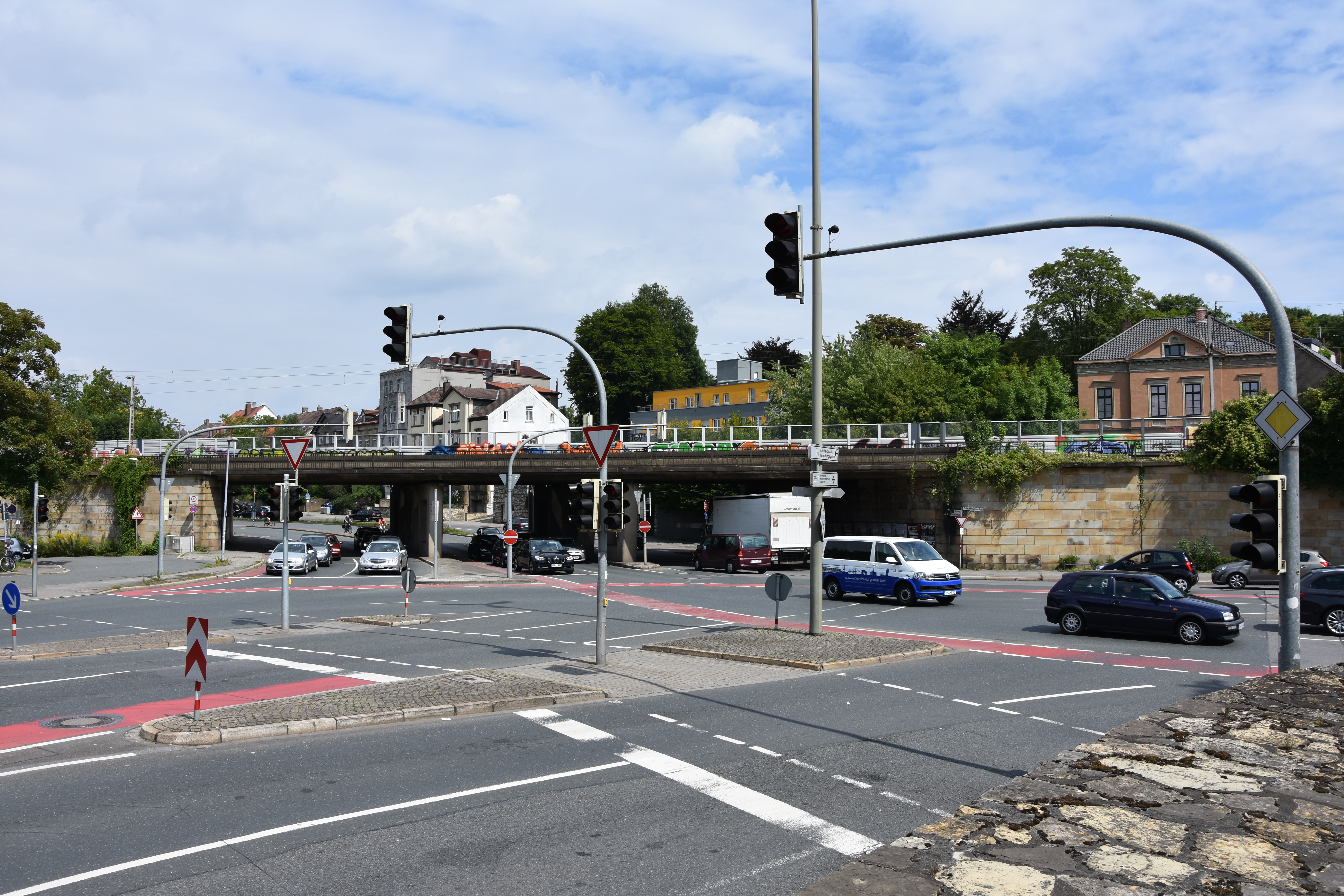 Kreuzung Hasetorwall - Erich-Maria-Remarque-Ring. Unter der Brücke beginnt die Hansastraße (B68)